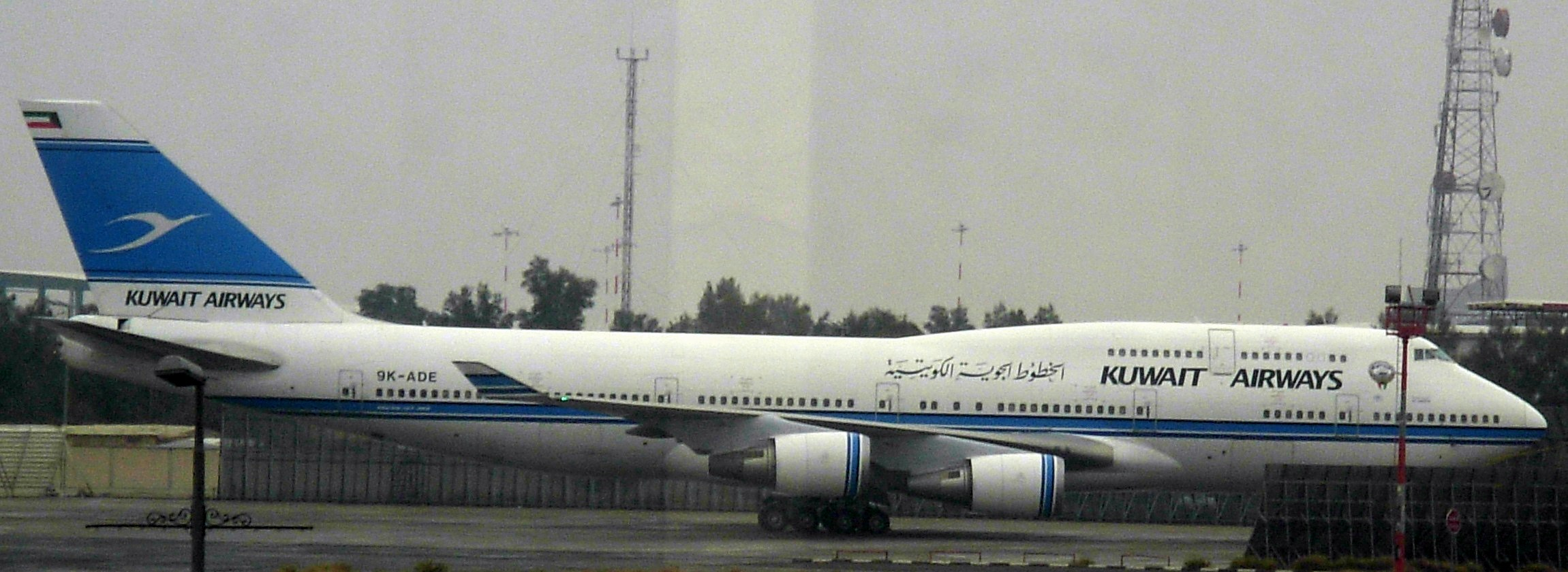 കുവൈറ്റ് എയർവേസിന്റെ